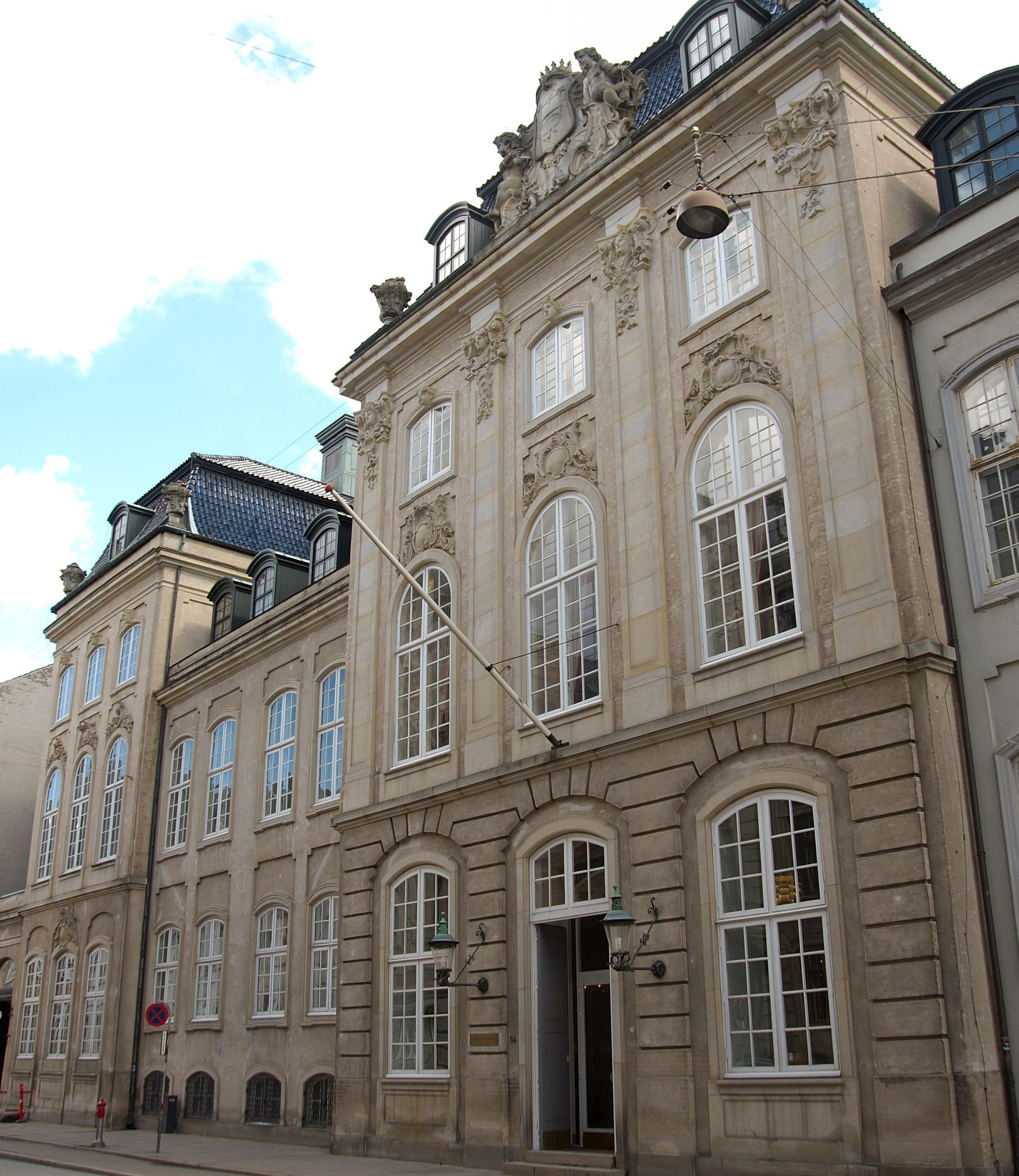 Dehns Palæ i Bredgade 54.